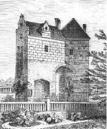 Zamek Kiszewski: Brama wjazdowa ok. 1880 (z: "Zabytki powiatów kartuskiego, kościerskiego i wejherowskiego". Gdańsk 1884)